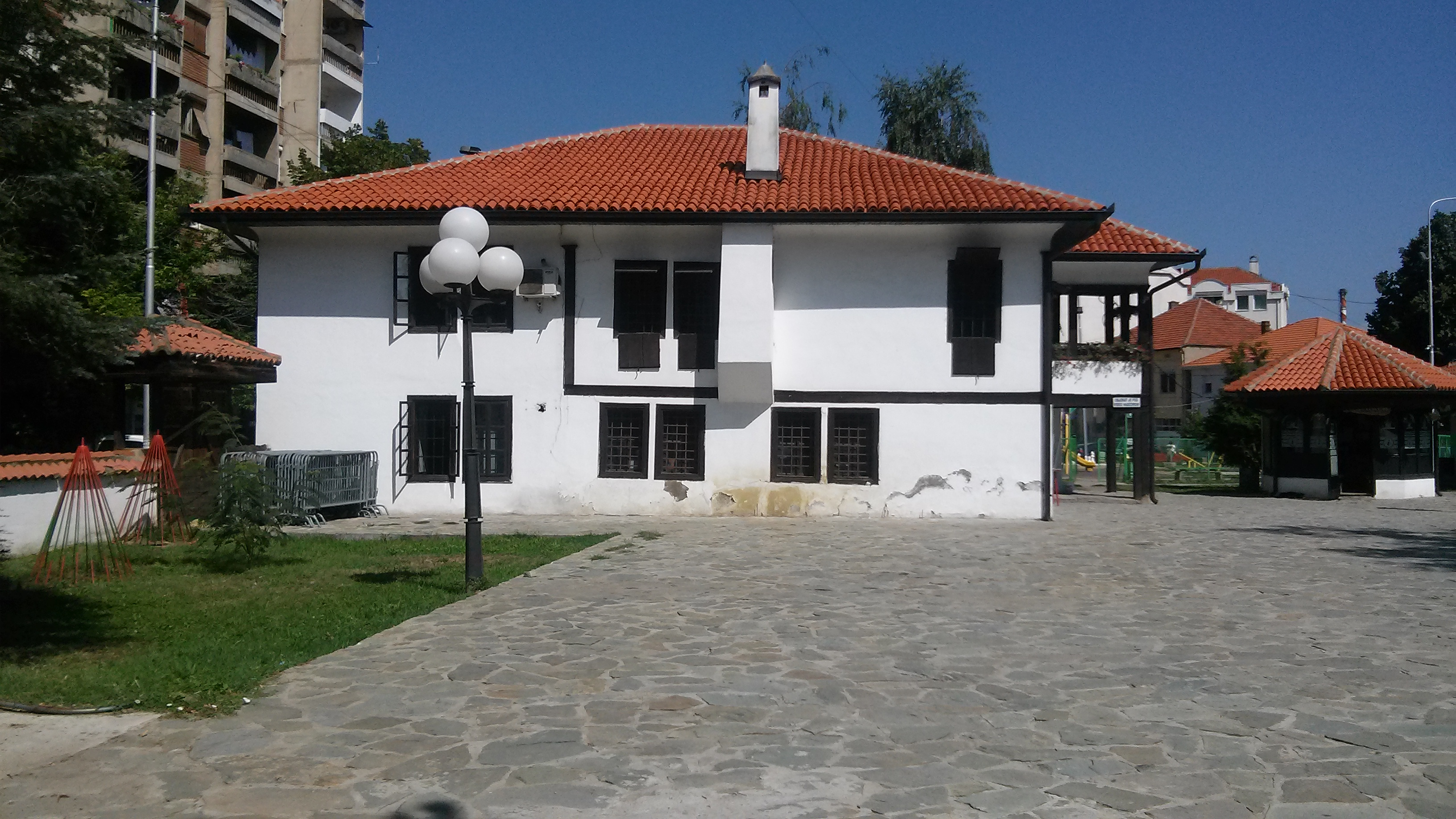 Šop Đokićeva kuća, Leskovac. Fotografija snimljena 24.08.2015.